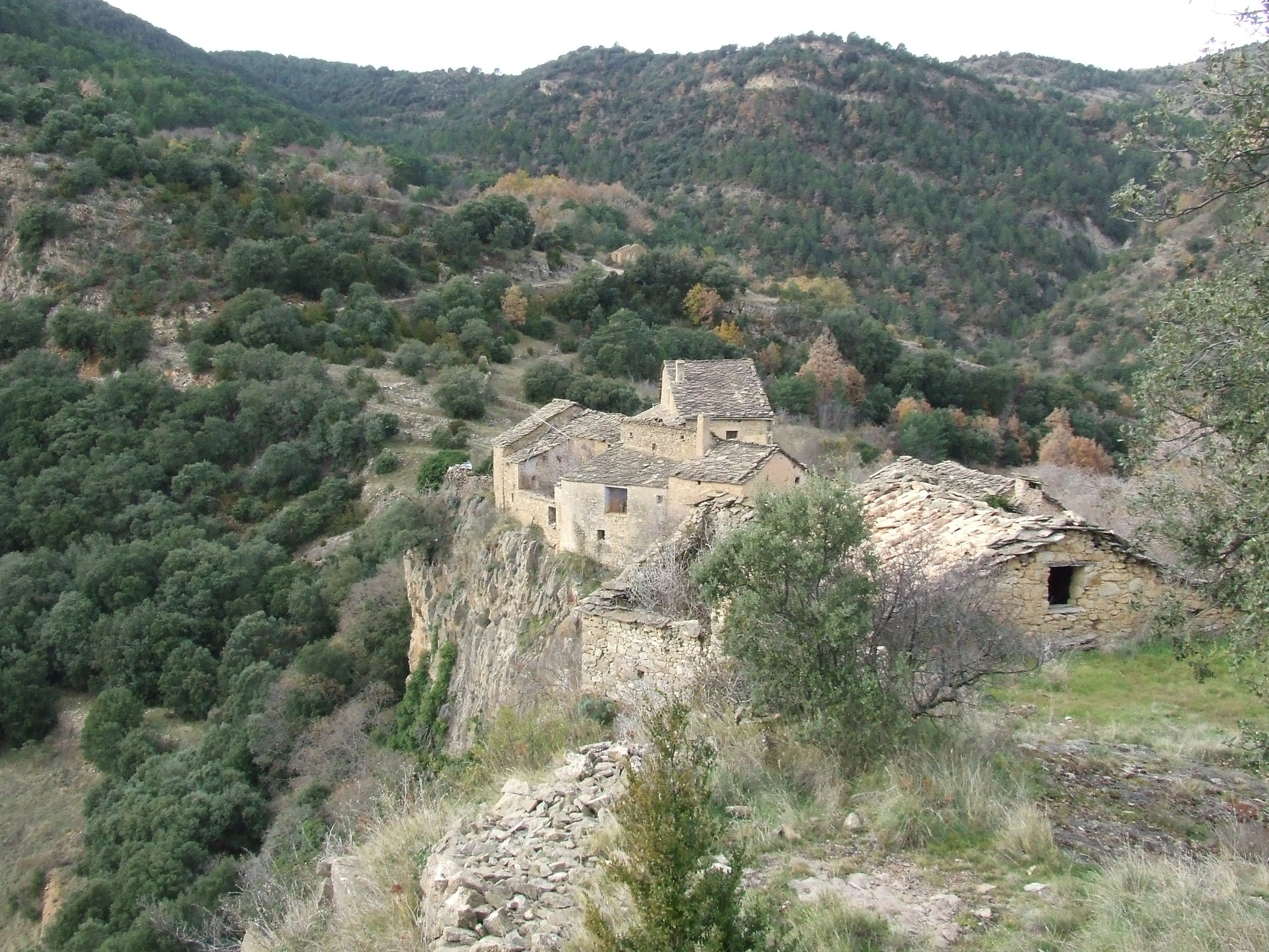 La Rua (Abella de la Conca, Pallars Jussà)